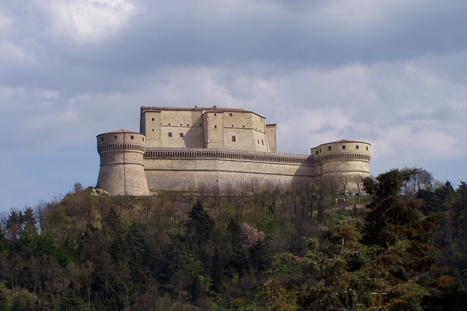 La rocca di San Leo. Foto personale. Aprile 2006